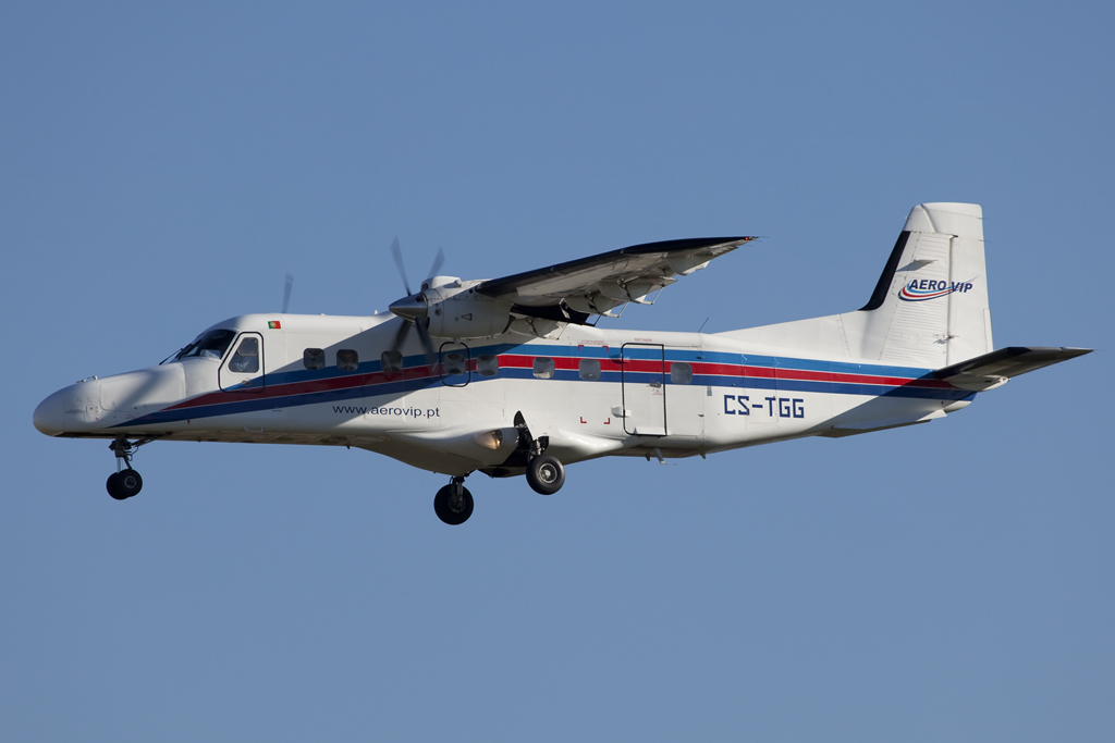 Lisboa